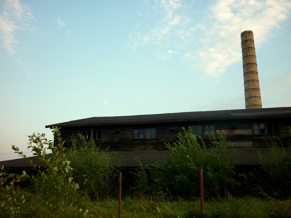 Nieczynna cegielnia od strony tylnego wjazdu, Wierzbica